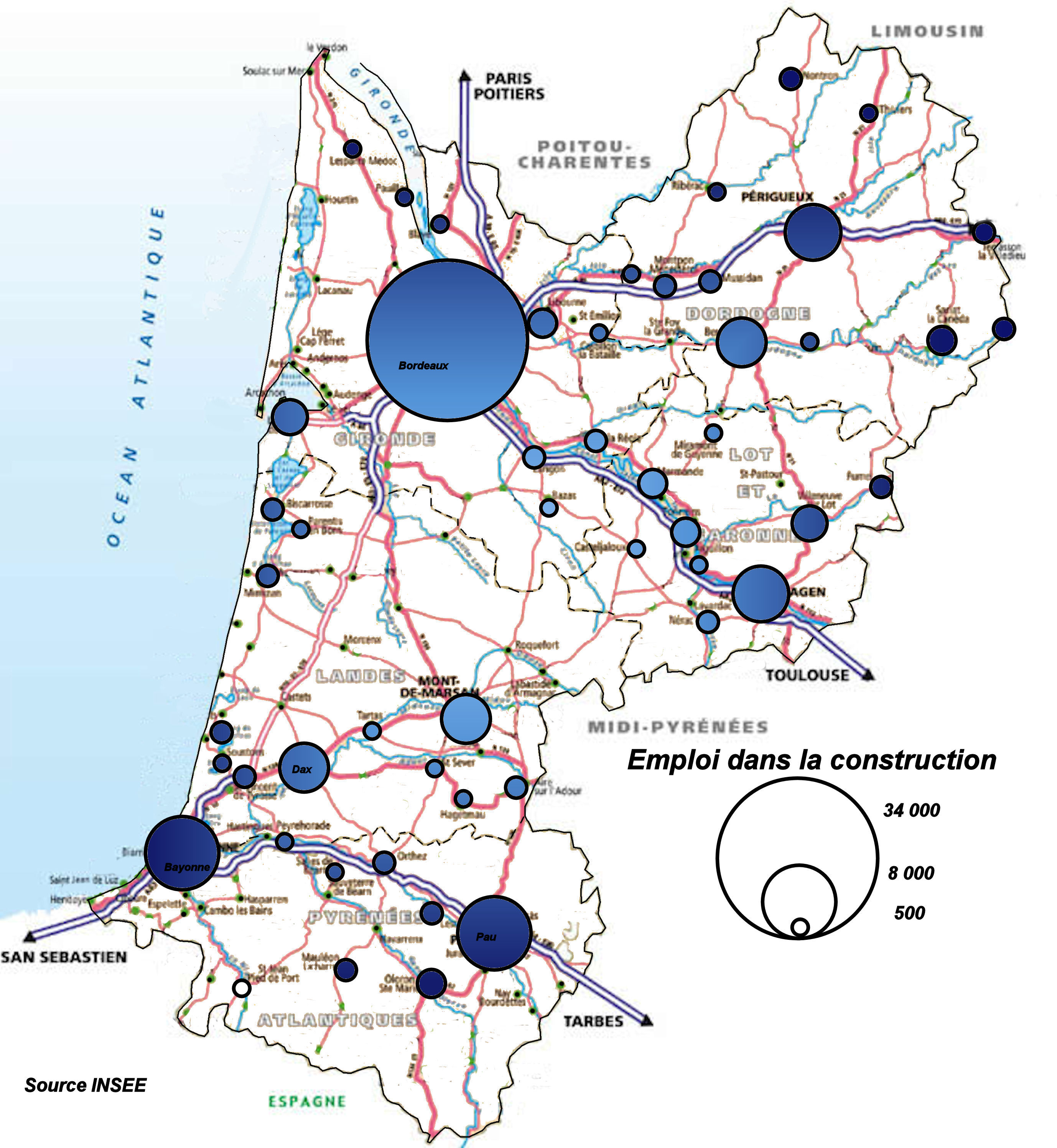 Les effectifs du B.TP en Aquitaine répartis entre les différentes aires urbaines d'après le recensement de l'INSEE de 2008